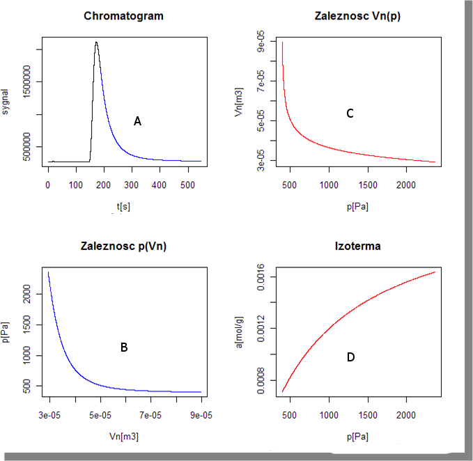 IGC - schemat obliczeń